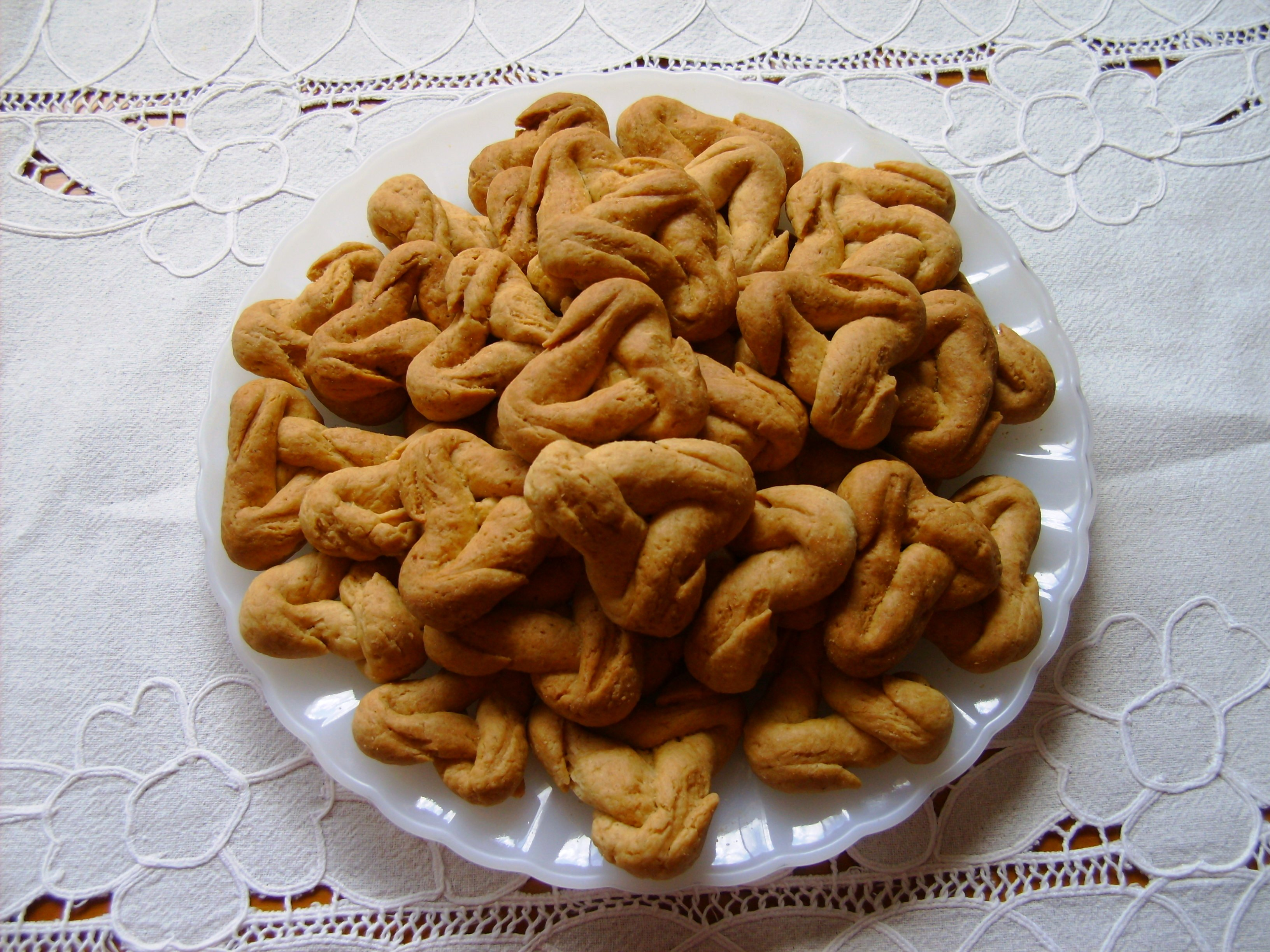 Biscoitos de Orelha (culinária regional mariense, artesã Sra. Maria dos Anjos), Ilha de Santa Maria (Açores), Portugal.